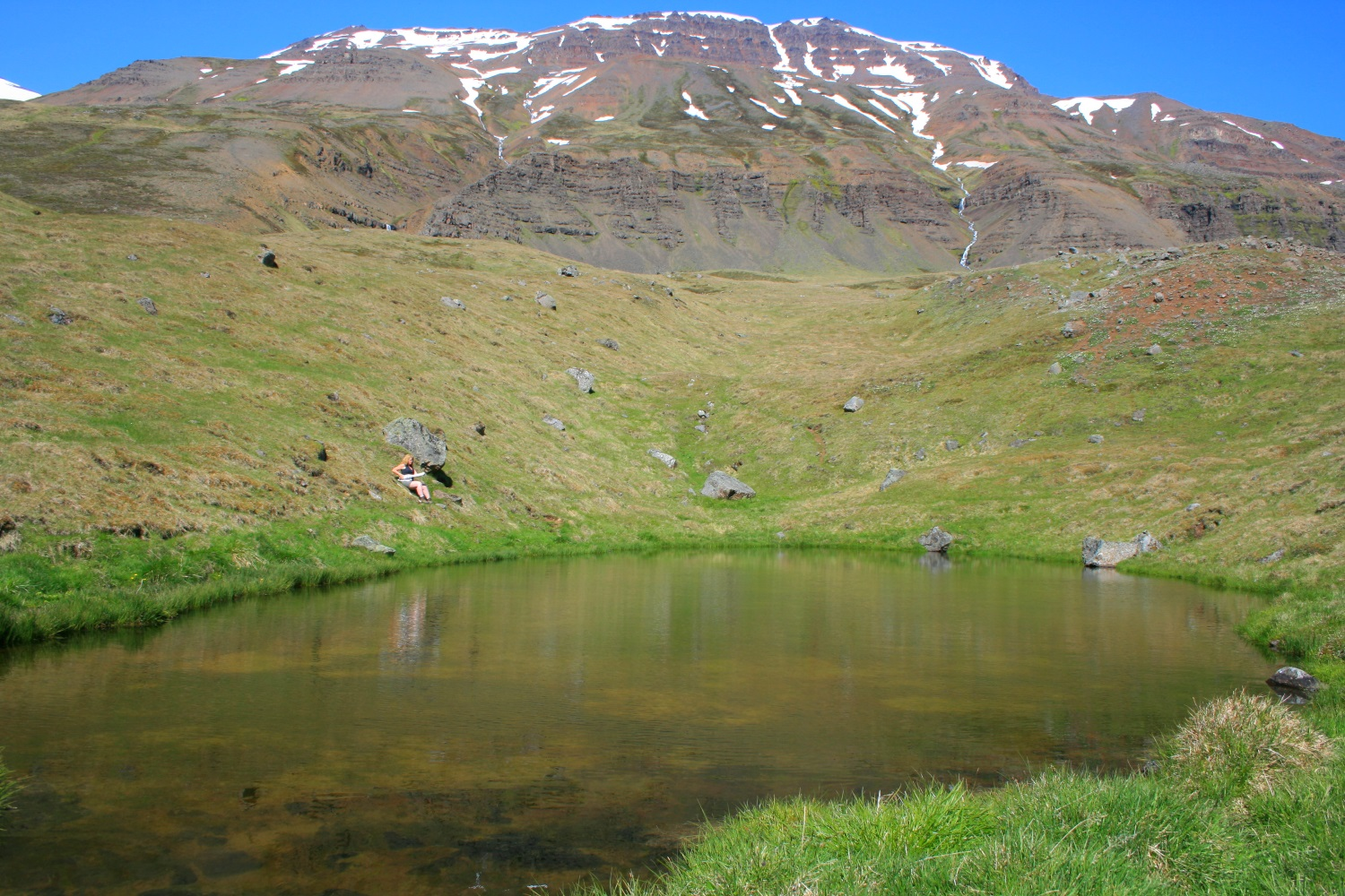 Tjörn í urðinni neðan við Urðabjörg